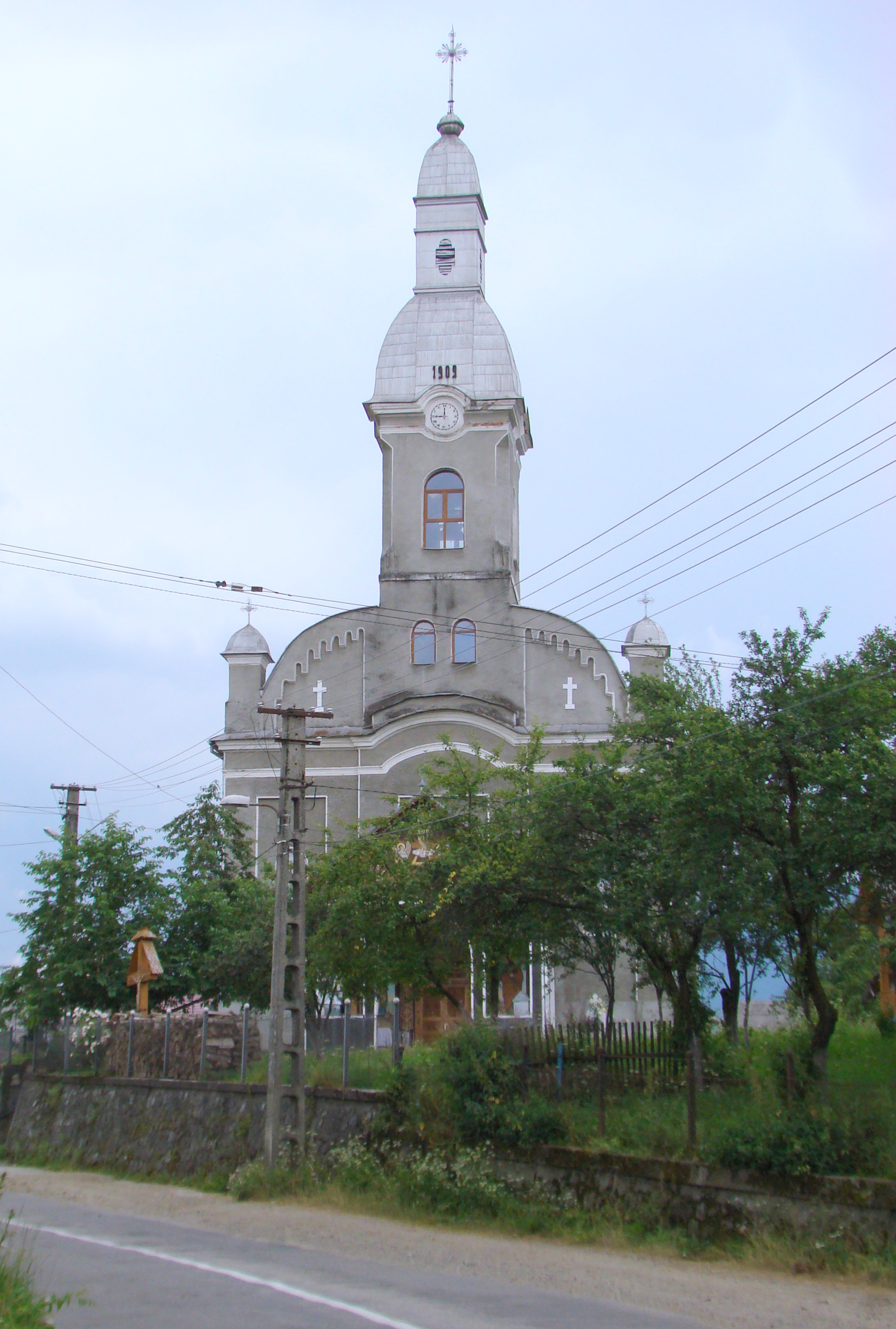 Biserica "Sf. Apostoli Petru şi Pavel", sat SĂCEL; comuna SĂCEL